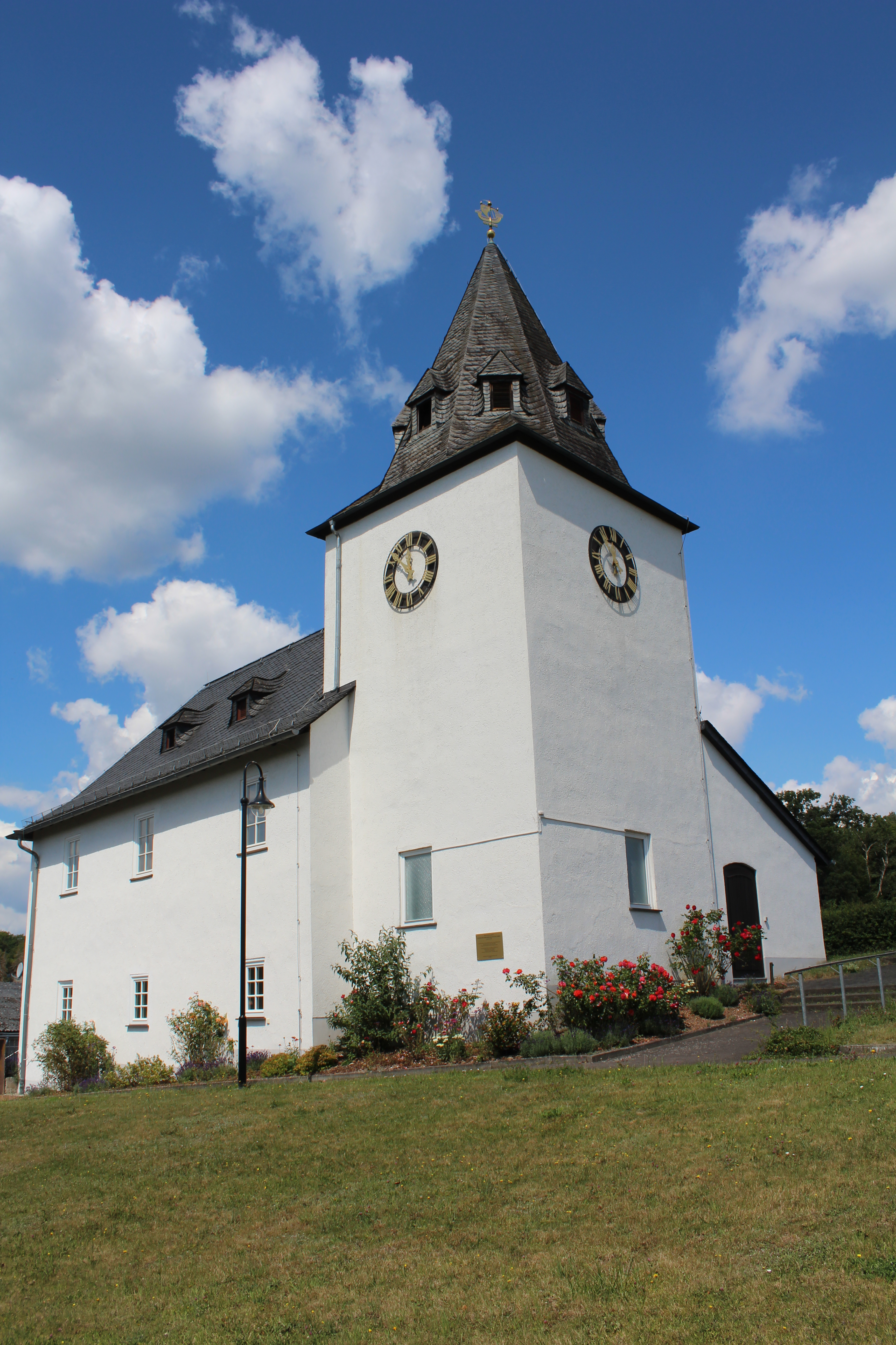 Evangelische Kirche Neukirchen, Braunfels, Lahn-Dill-Kreis, Hessen, Deutschland